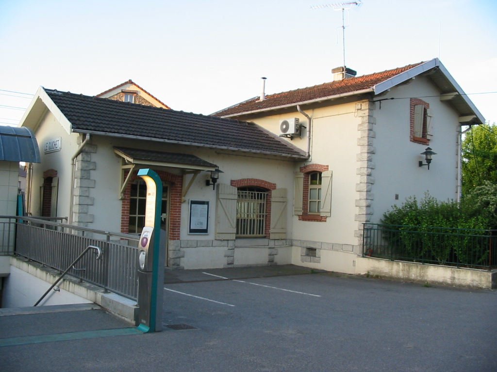 gare Le Guichet, RER B, France